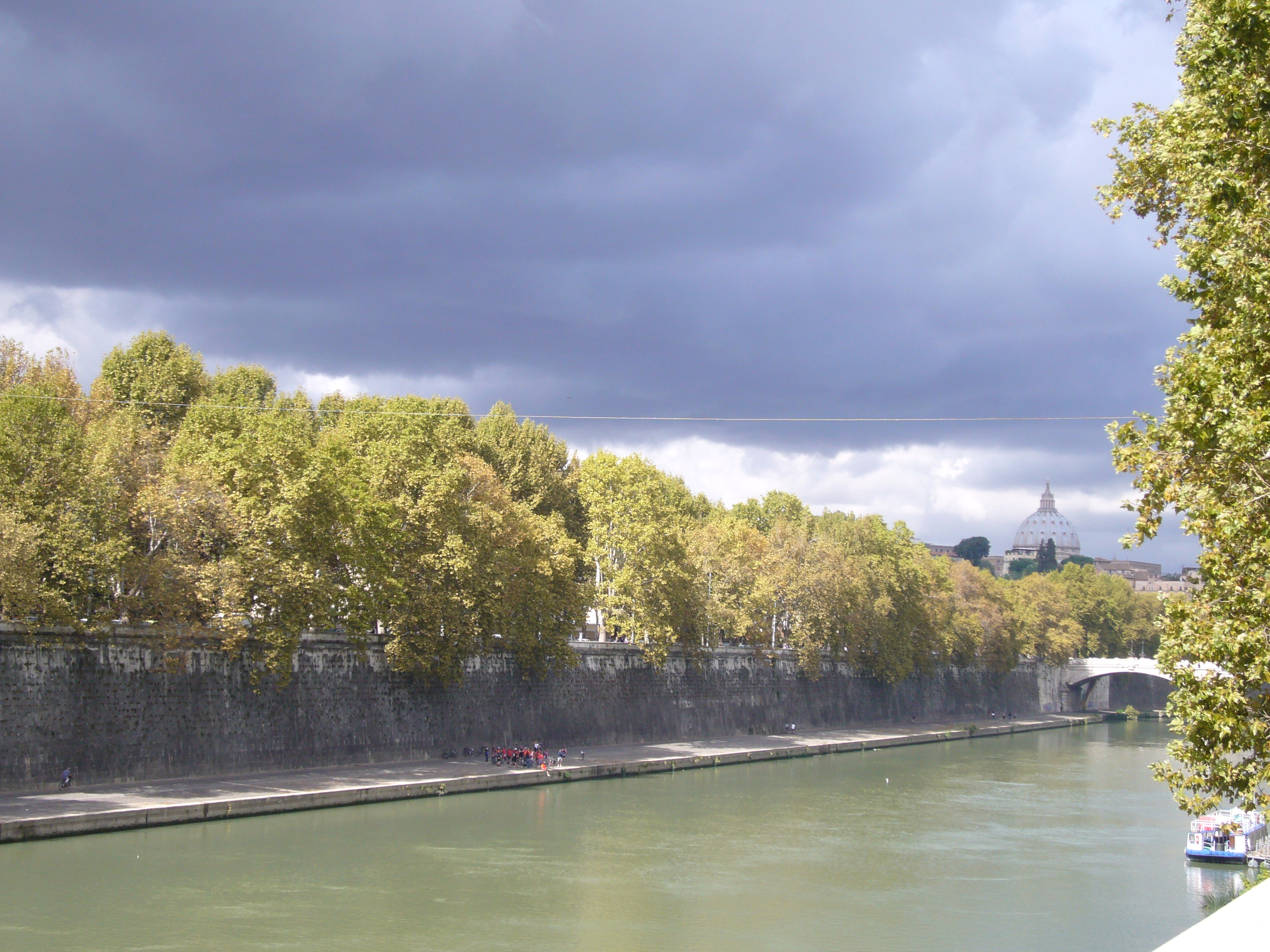 Roma, lungotevere della Farnesina